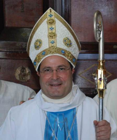 Mons. Calogero La Piana Arcivescovo Metropolita di Messina